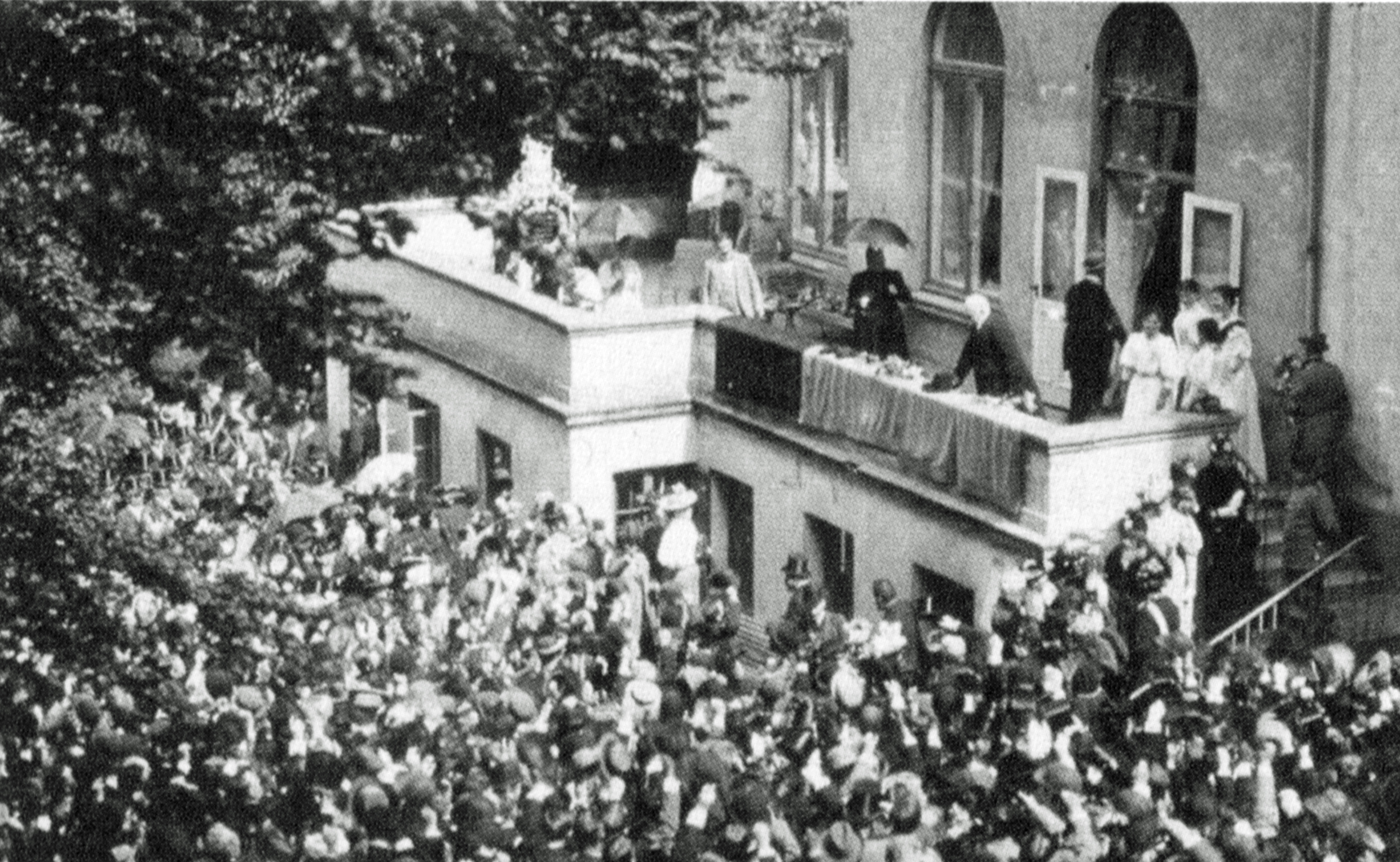 Ansprach von Otto von Bismarck im Jahr 1895 80. Geburtstag